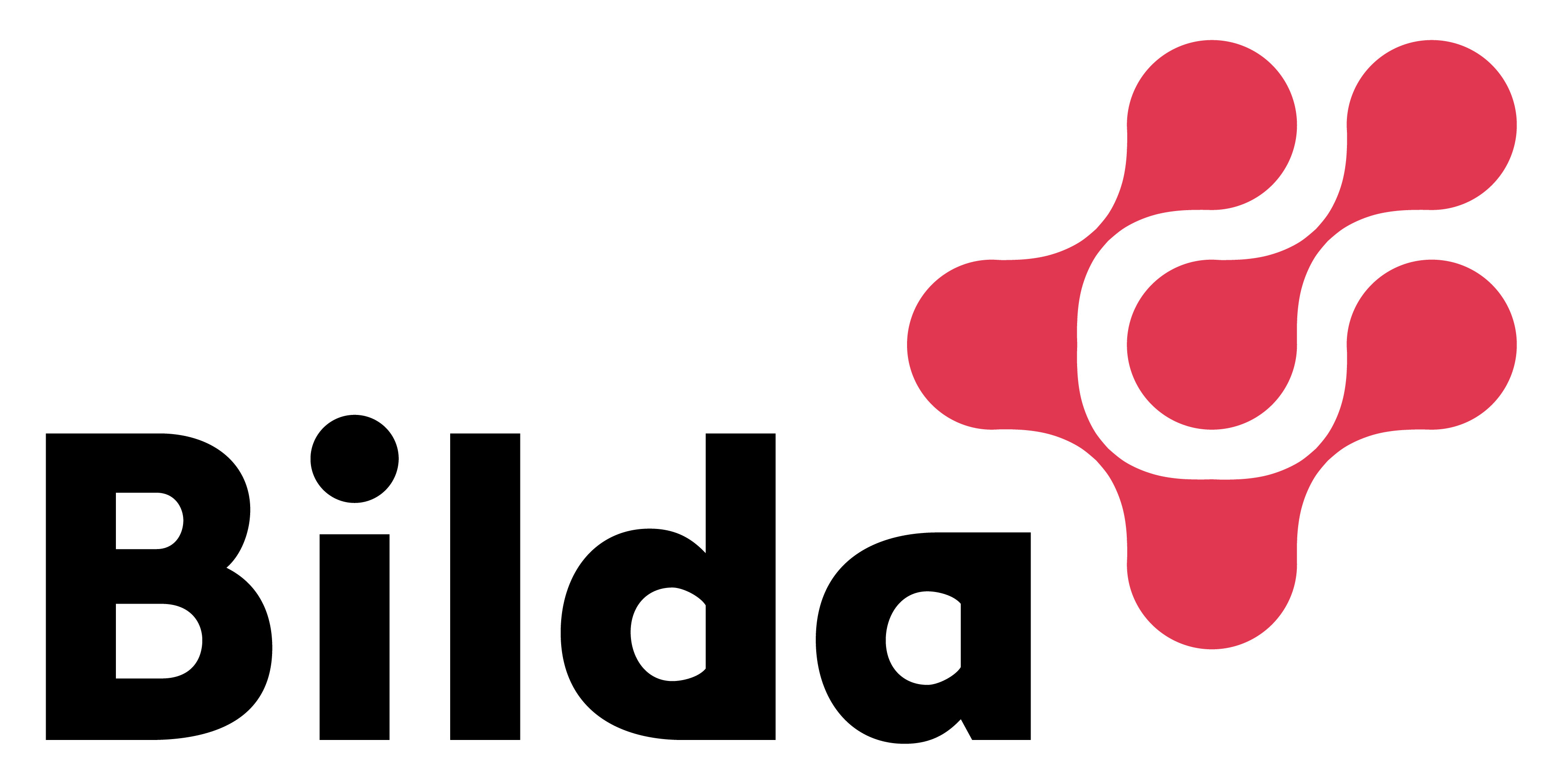 Studieförbundet Bildas logotype (svartvit), upplåten med benäget tillstånd och får användas som illustration på Wikipedia i artiklar som handlar om, eller benämner, Studieförbundet Bilda.